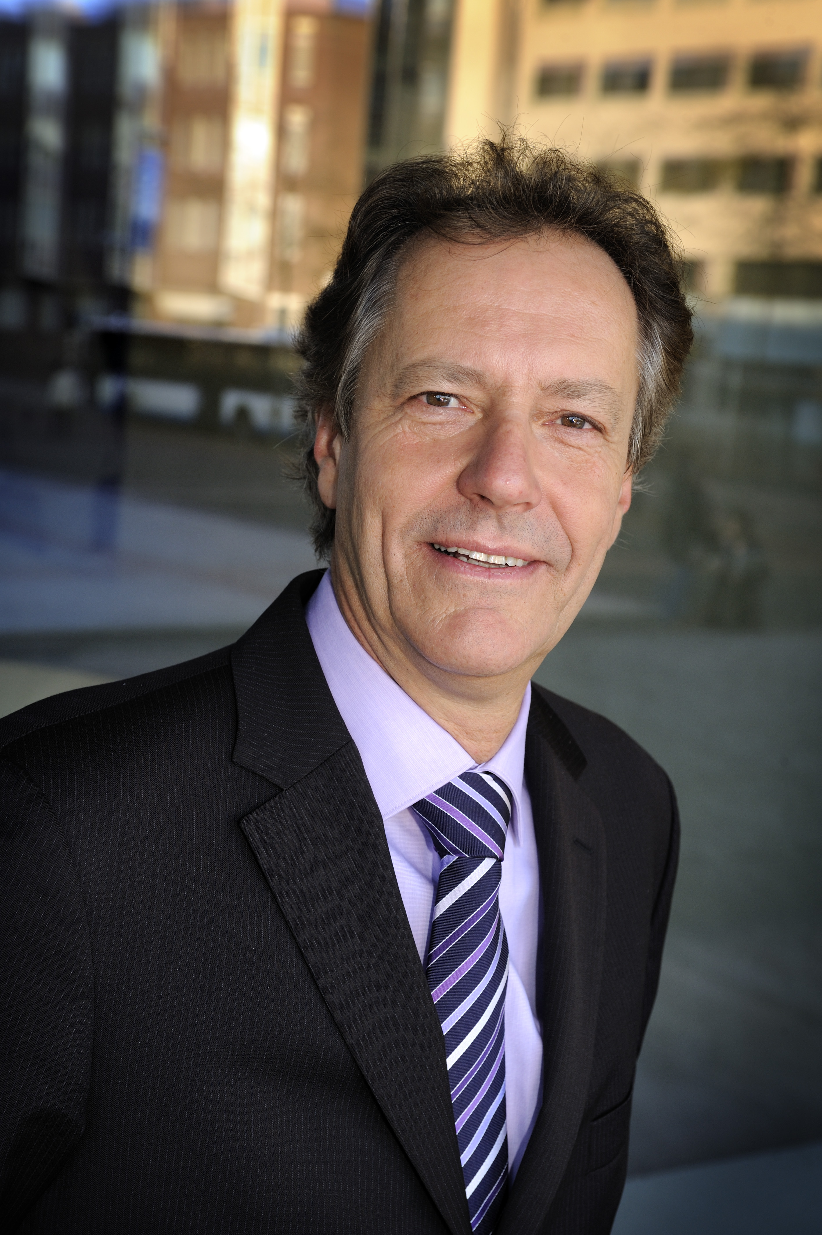 Rob van Gijzel, burgemeester van Eindhoven